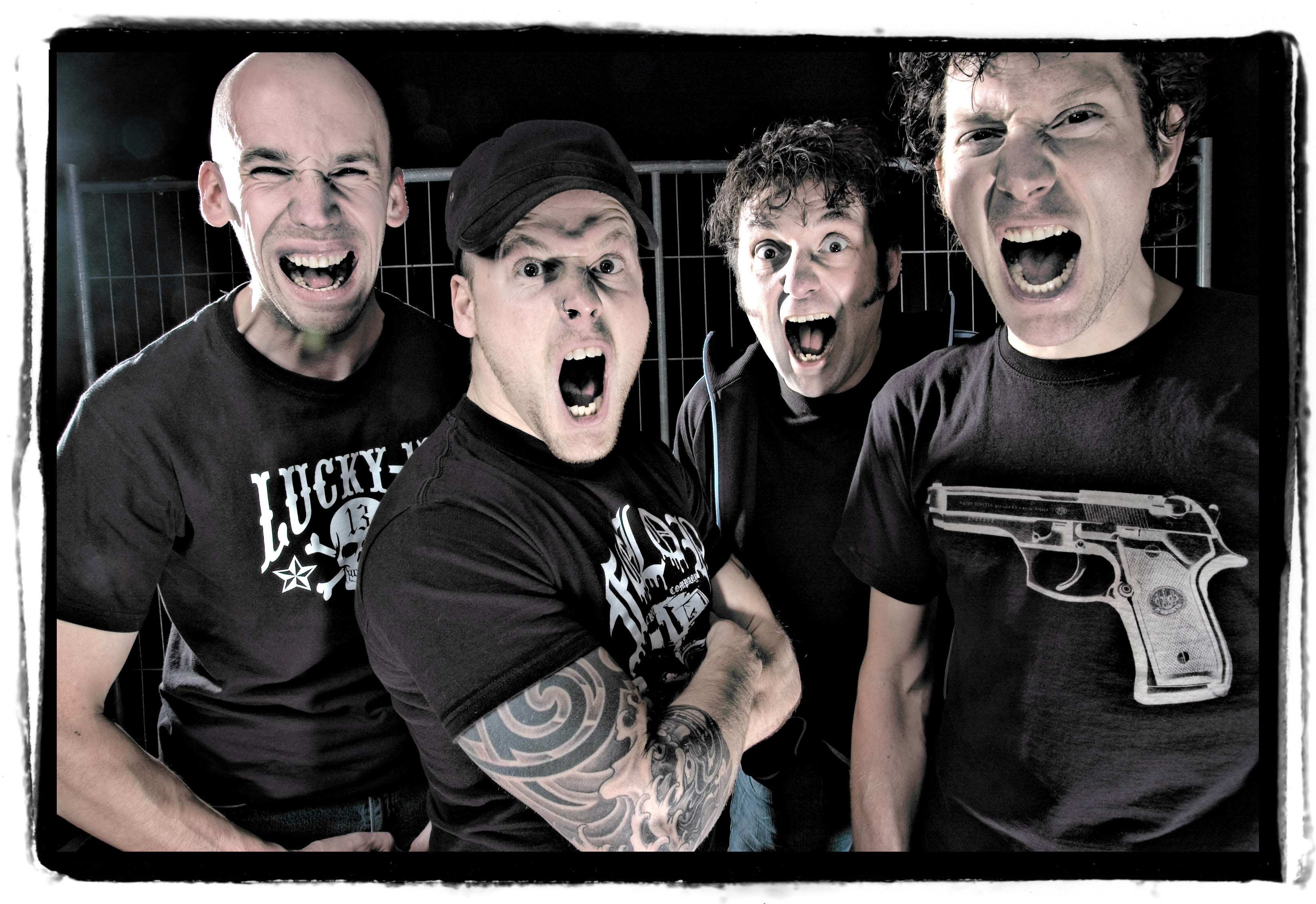 De Heideroosjes